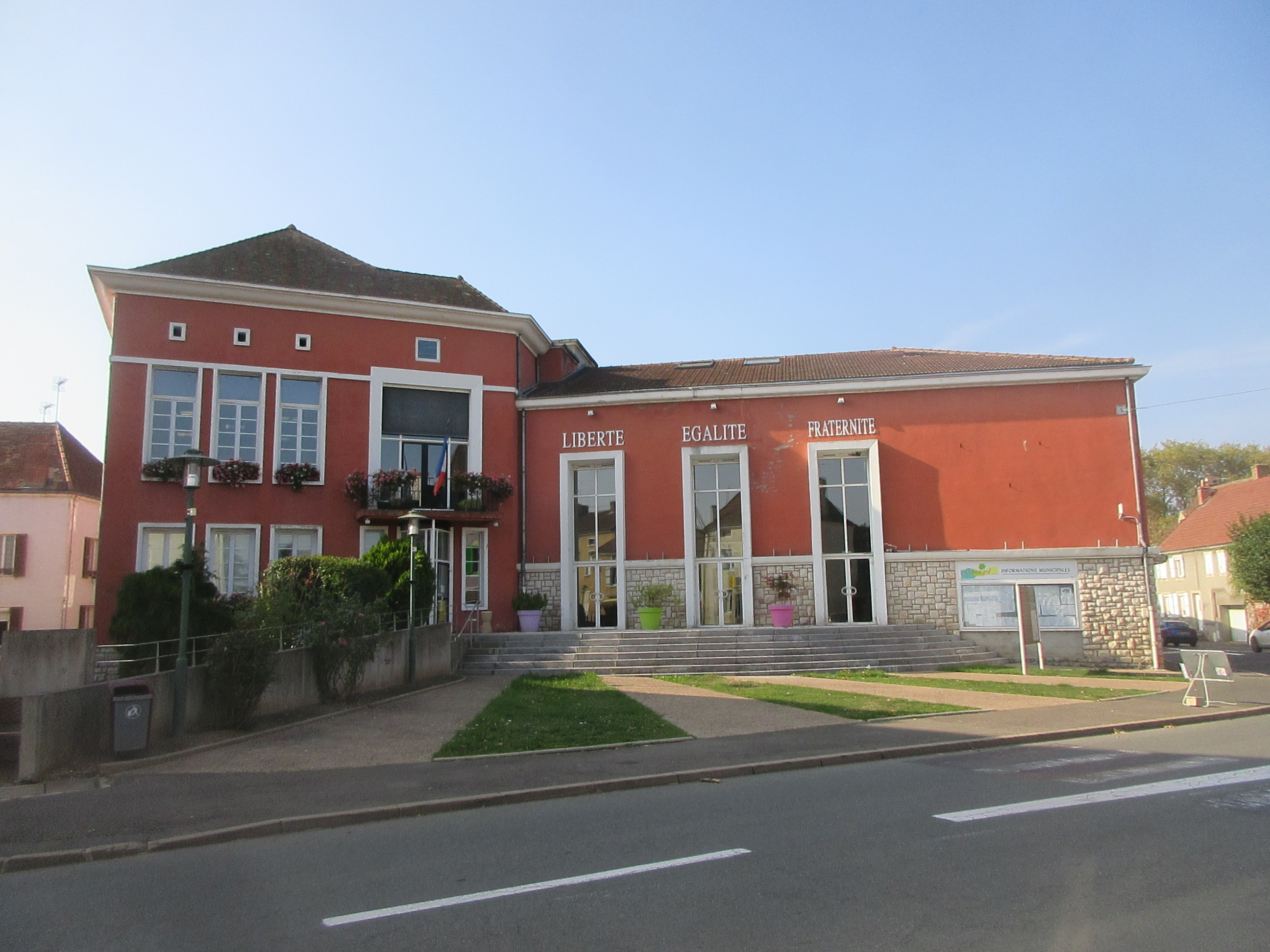 Mairie de Génelard.